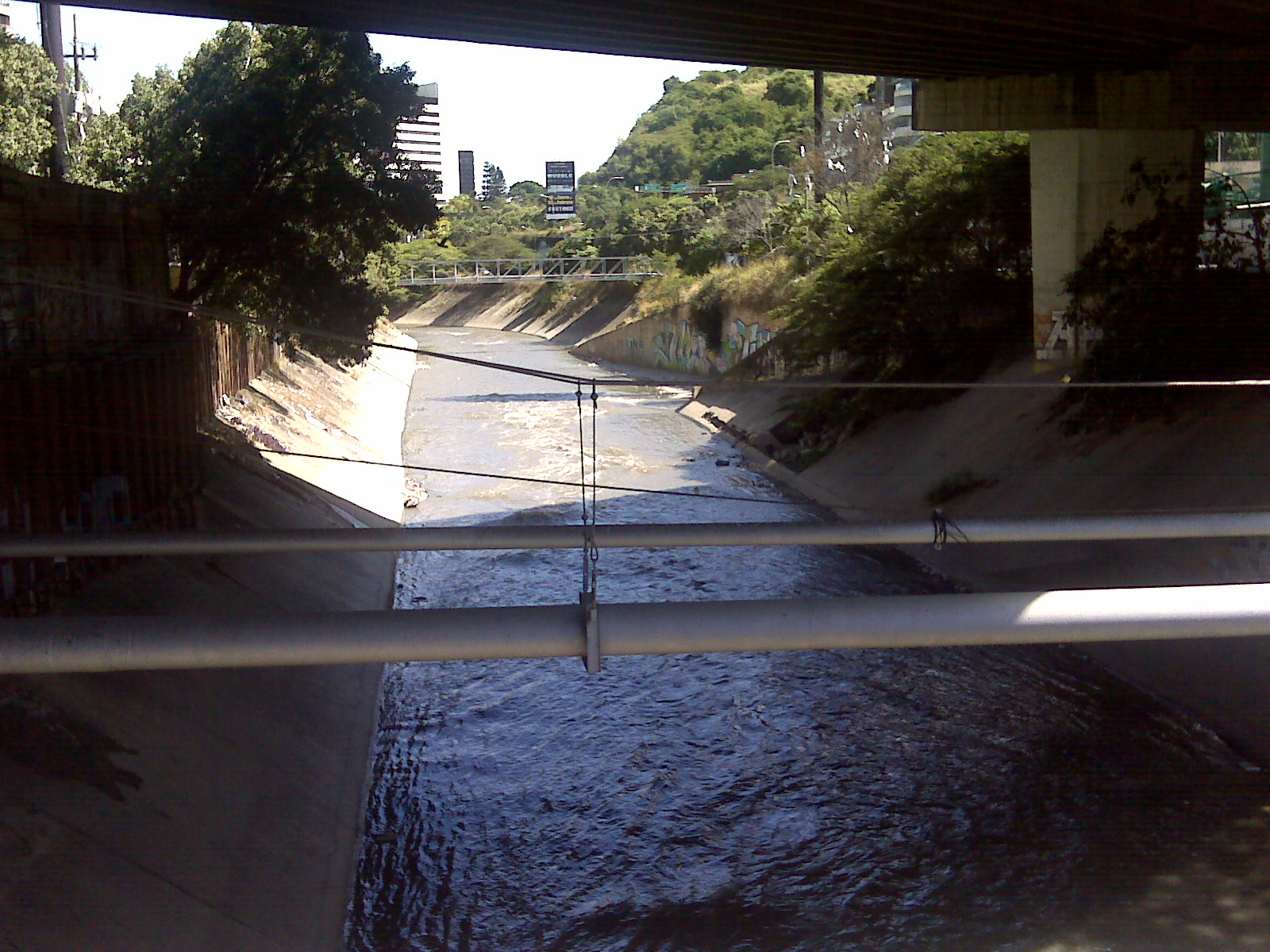 Río Guaire a nivel de Puente Veracruz Las Mercedes, Caracas - Venezuela